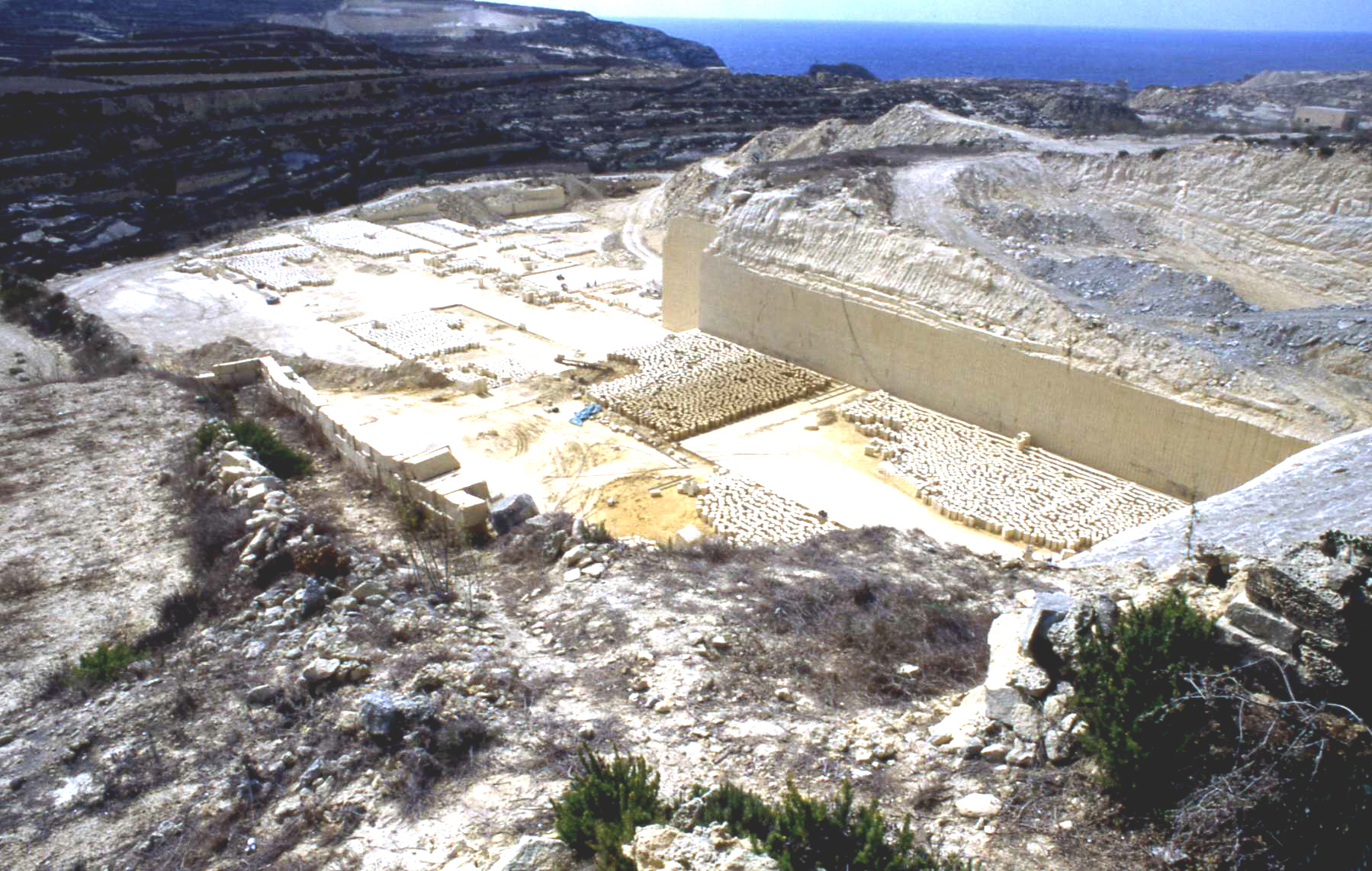 Steinbruch nahe dem Fungus-Rock